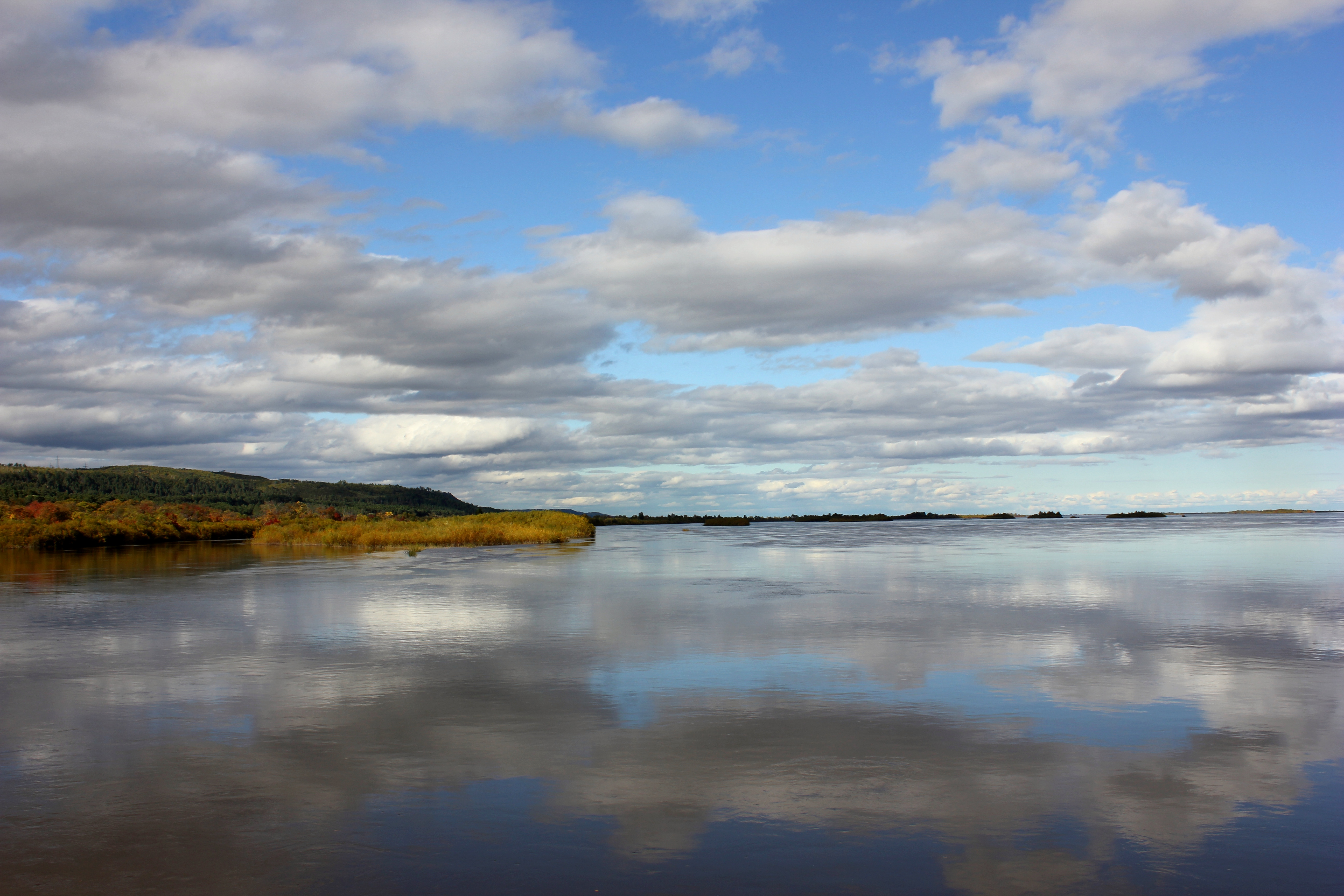 Урочище Мухинка, Благовещенск This image is related to the protected area of Russia number 2810037